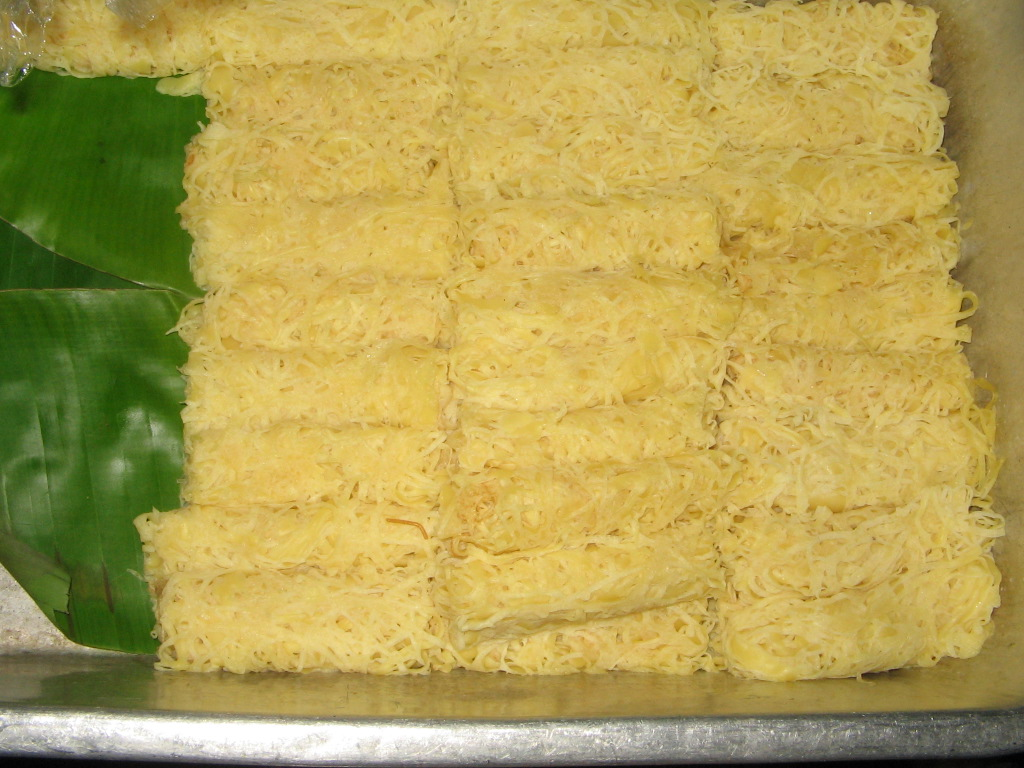 Roti Jala 2005@Mohamed Yosri